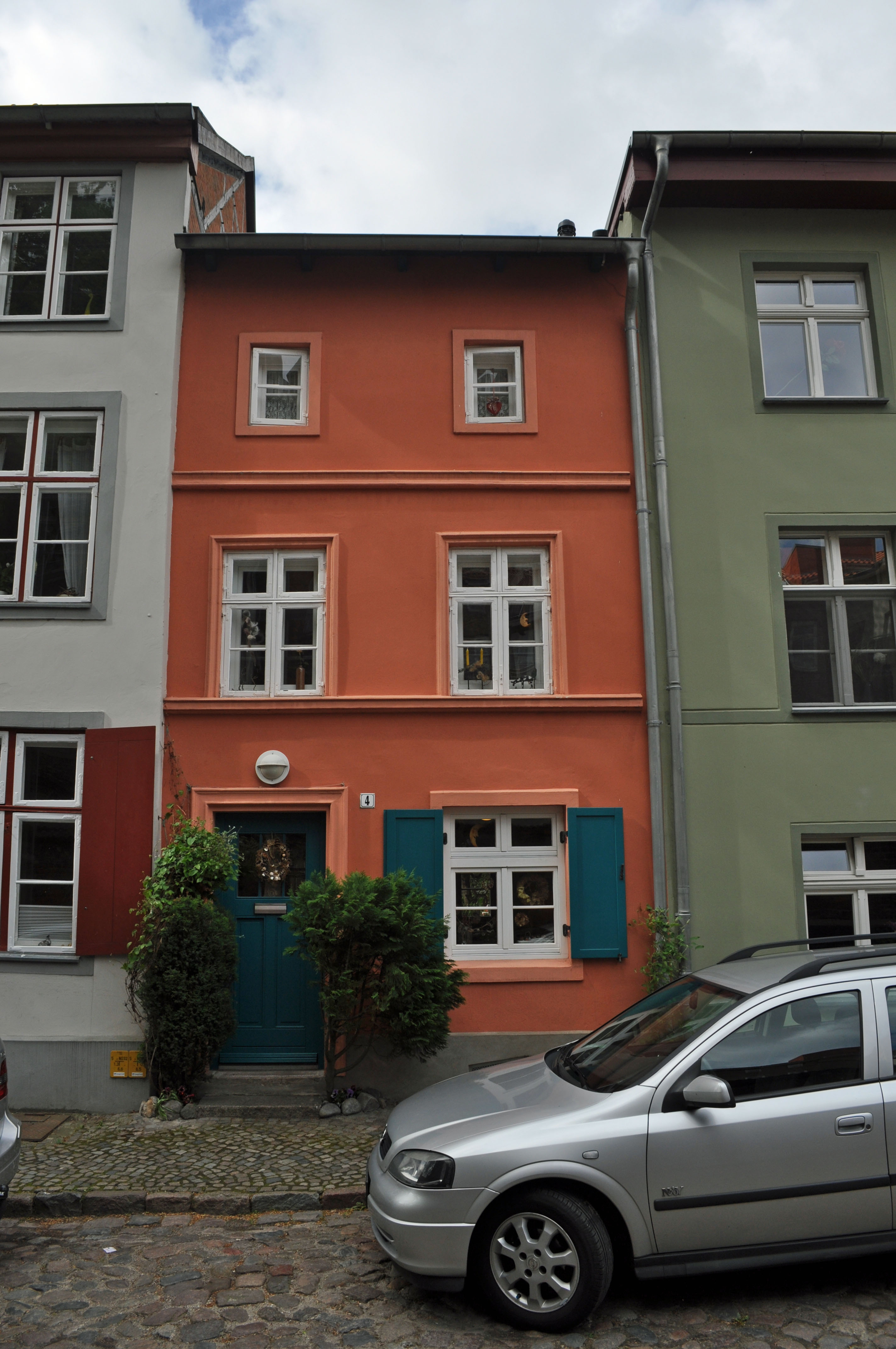 Gebäude in Stralsund, siehe Dateiname